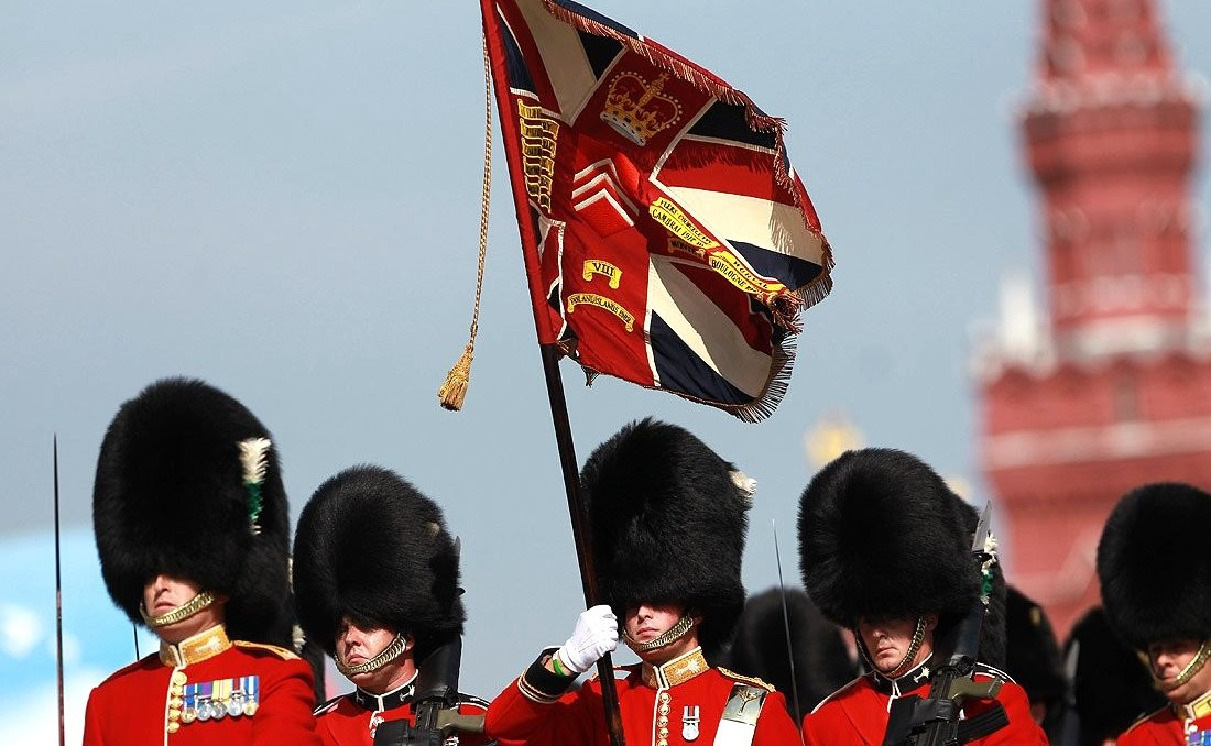 Военный парад, посвящённый 65-летию Победы в Великой Отечественной войне.